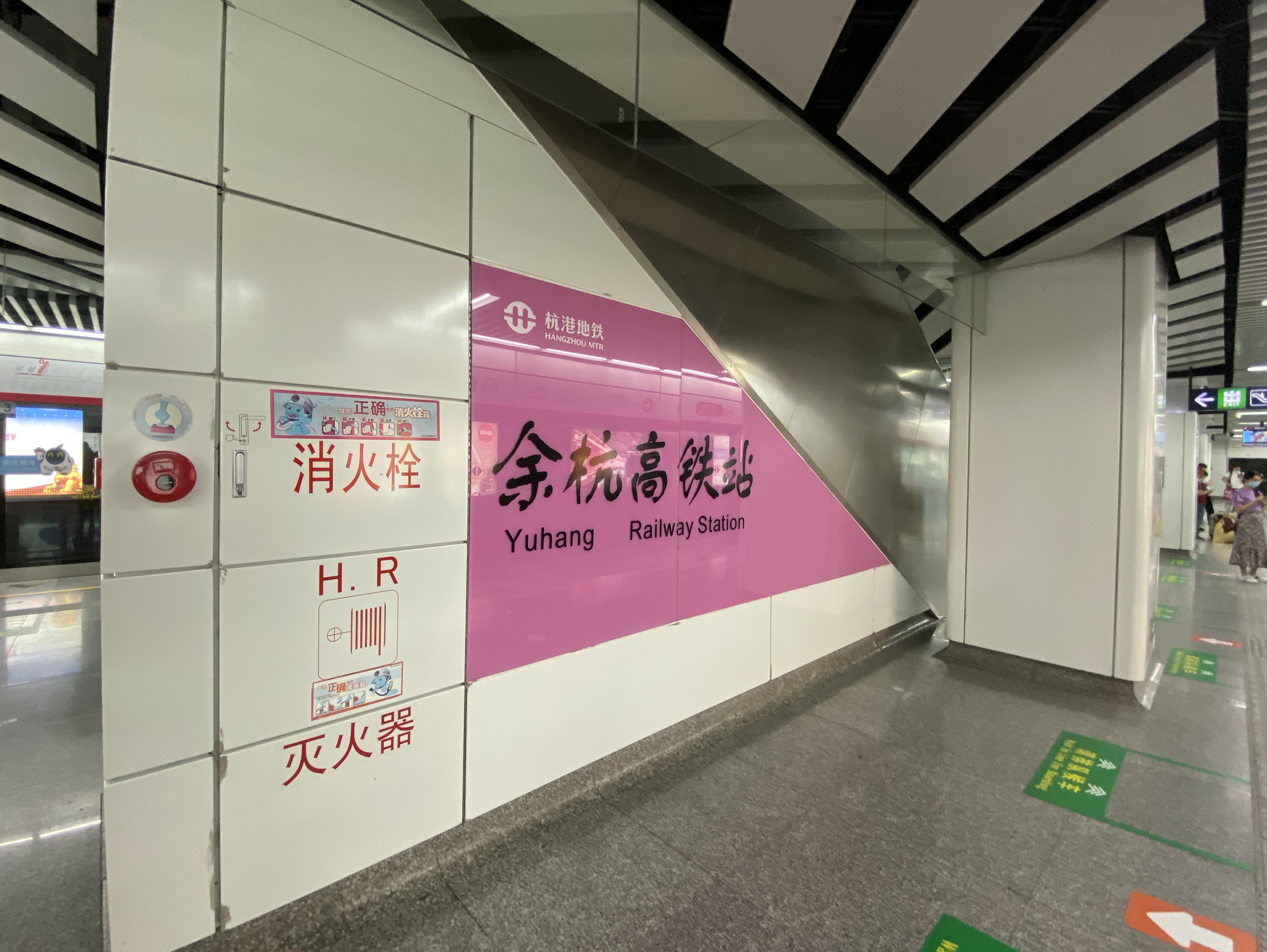 杭州地铁余杭高铁站站